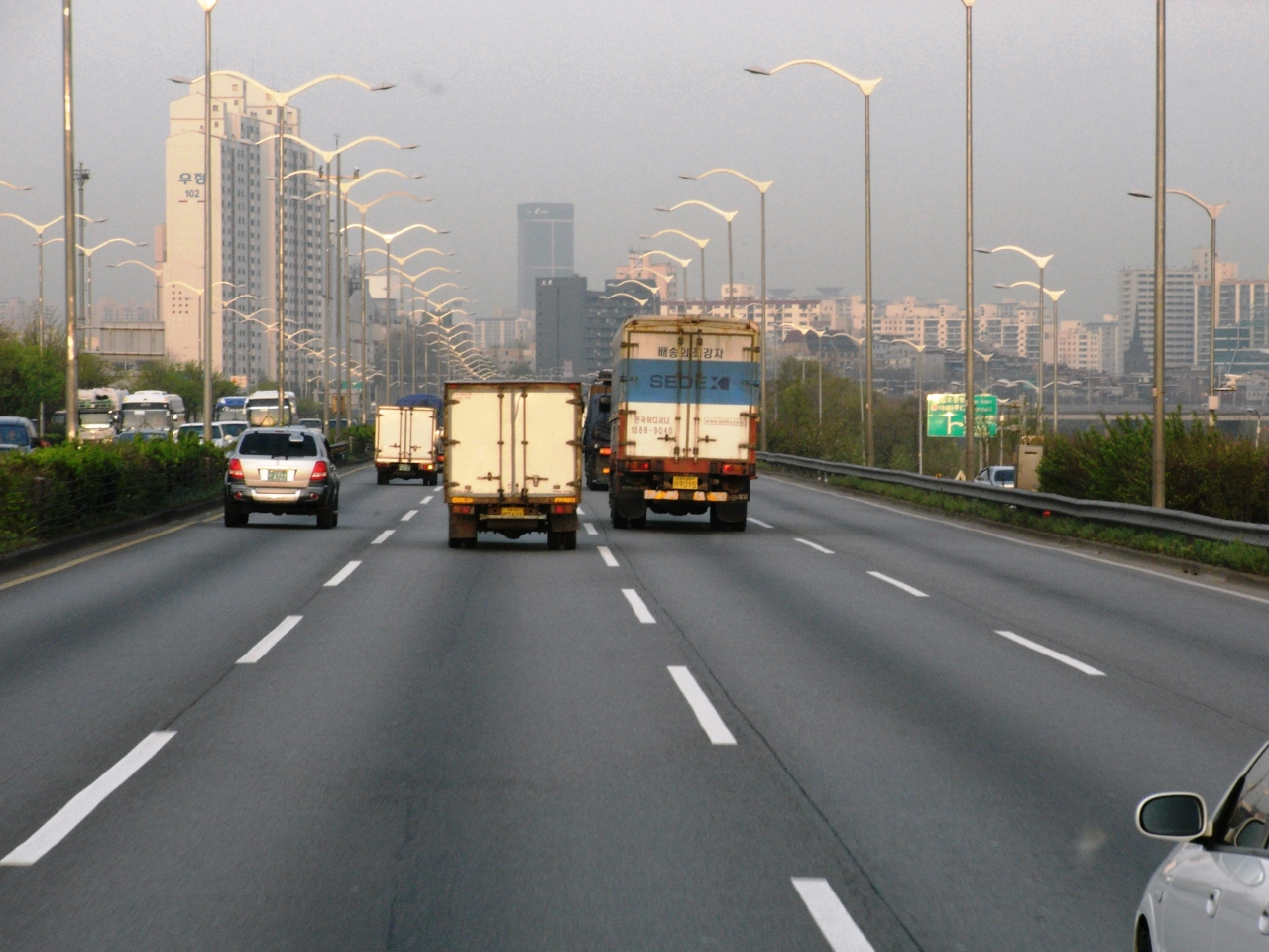 올림픽대로. 여의로 근차